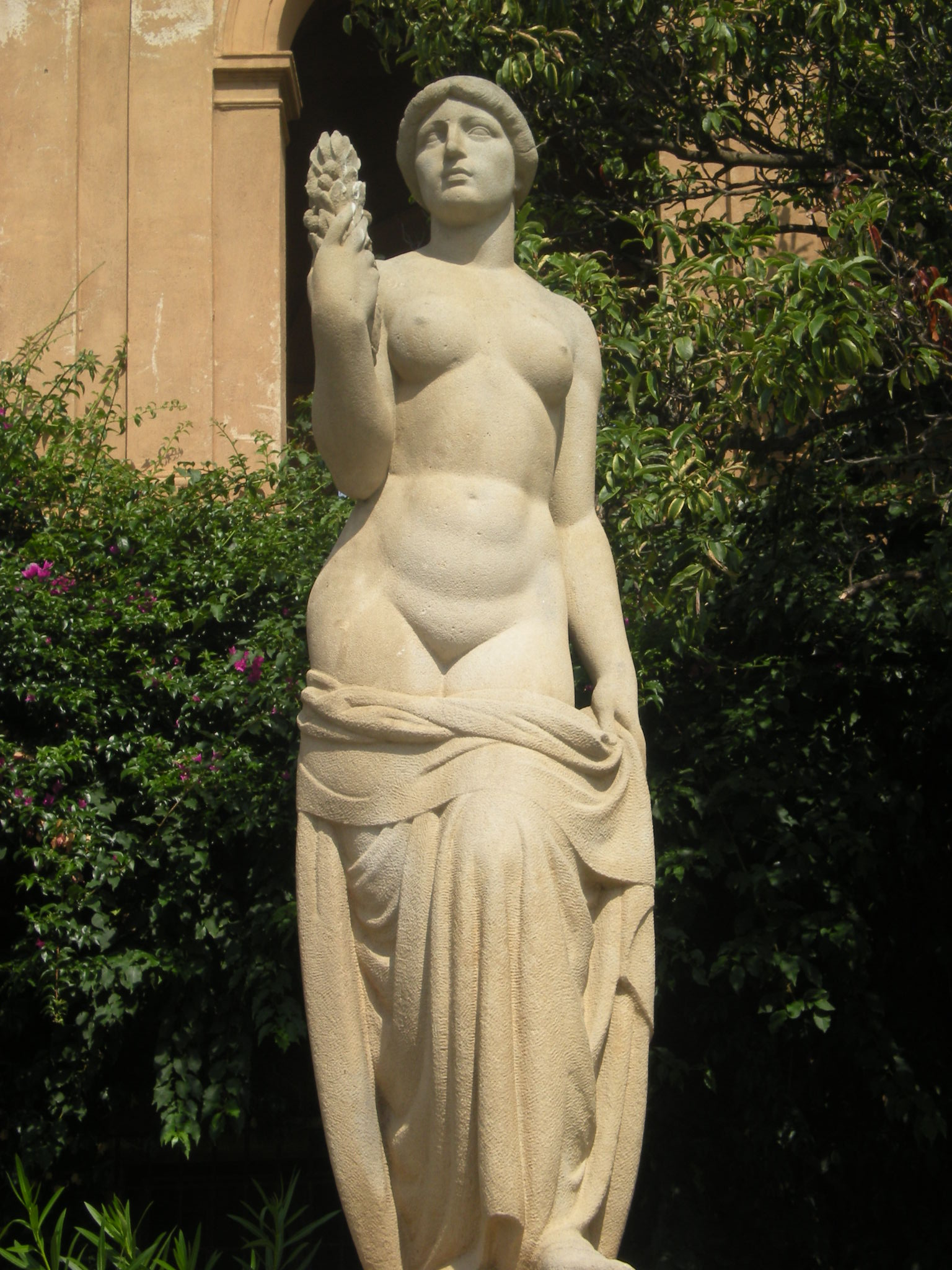 Estàtua exterior A (Barcelona)